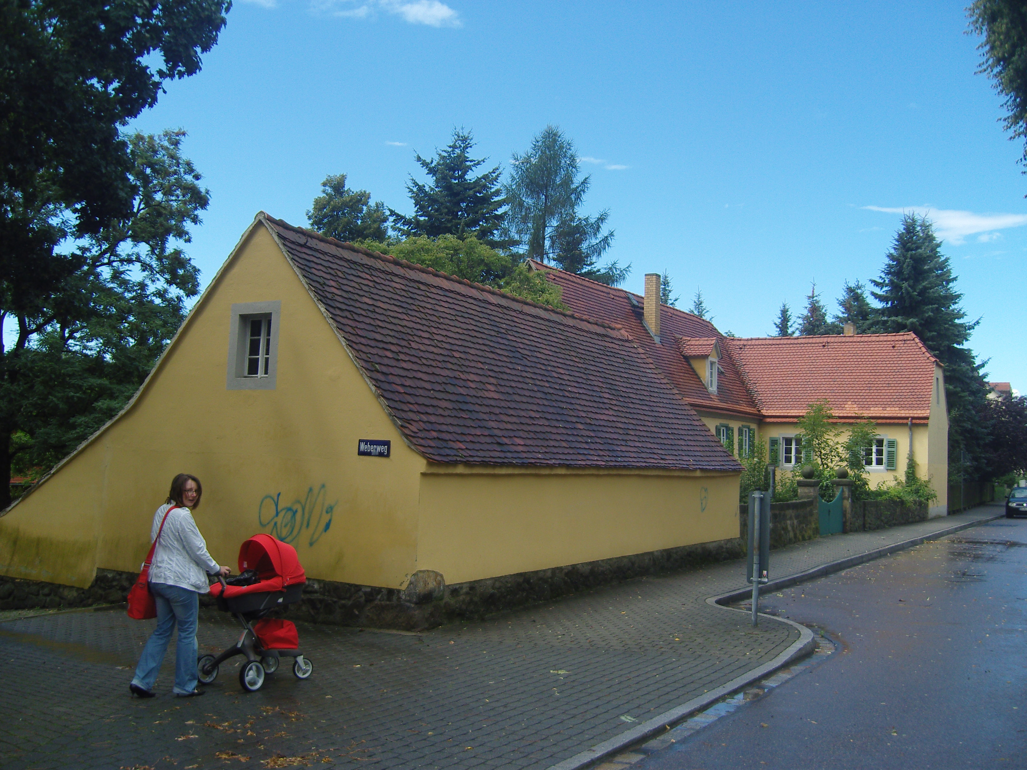 Carl-Maria-von-Weber-Museum in Dresdner Straßen in Dresden